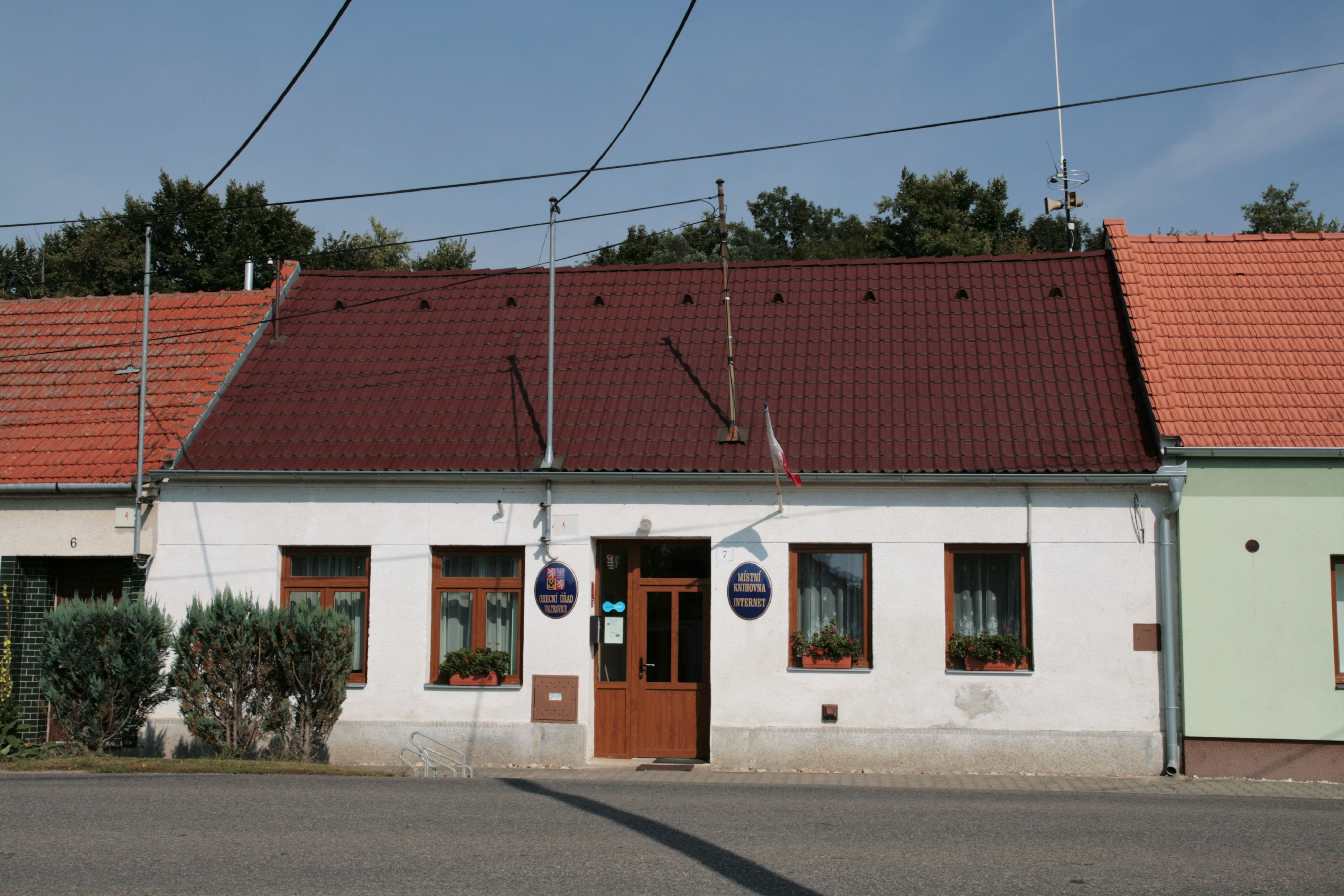 Obec Valtrovice v okrese Znojmo. Obecní úřad u hlavní silnice.